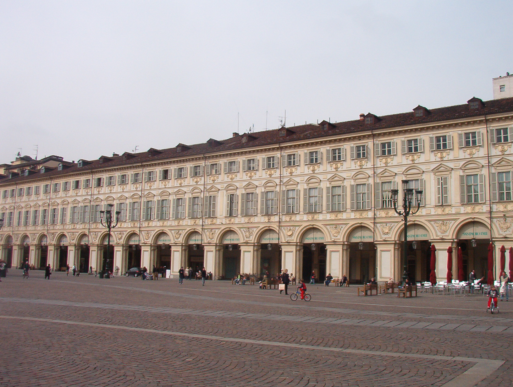 Lato di Piazza san Carlo - Torino - Italia